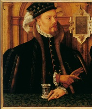 Der Graf Johann der II von Rietberg; part of (cropped) Familienbildnis des Grafen Johann II. von Rietberg